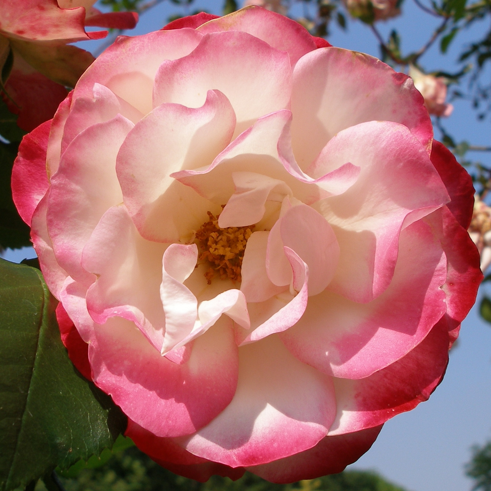 Rose Jubilé Prince de Monaco (Variété Meisponge) Meilland "Rosaceae" roseraie du jardin des Plantes de Paris (Vème)